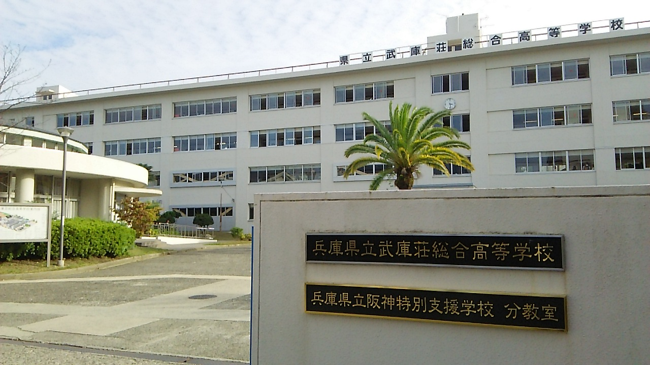 兵庫県立武庫荘総合高等学校と兵庫県立阪神特別支援学校分教室の校門を校門の外から撮影